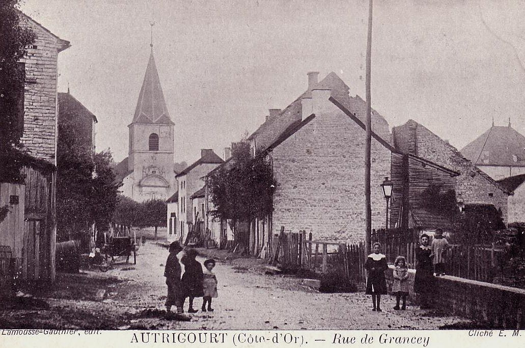 Scan d'une carte postale ancienne (vers 1910) "Autricourt, rue de Grancey"